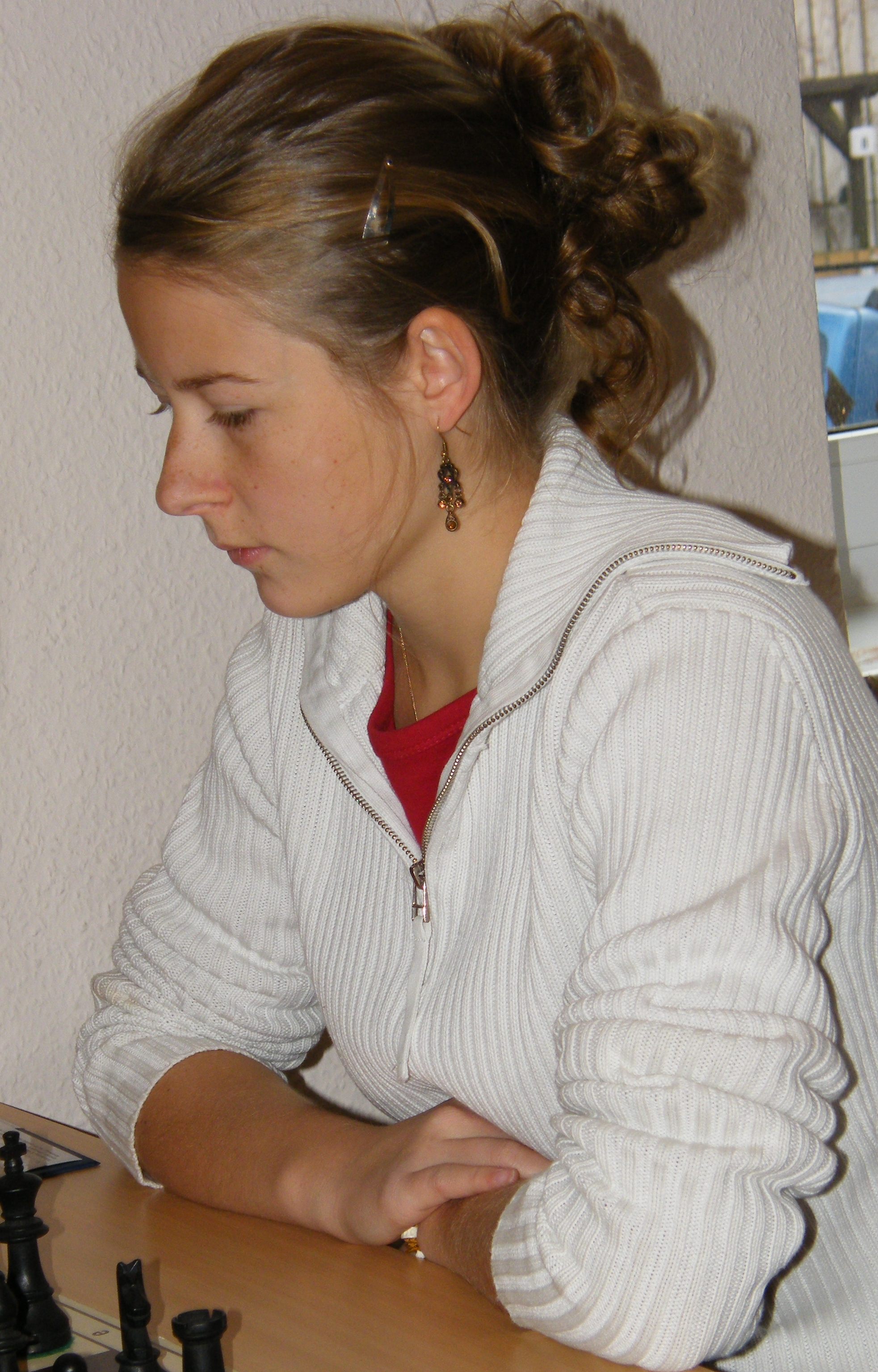 Melanie Ohme bei einem Wettkampf der Frauenbundesliga in Berlin-Pankow